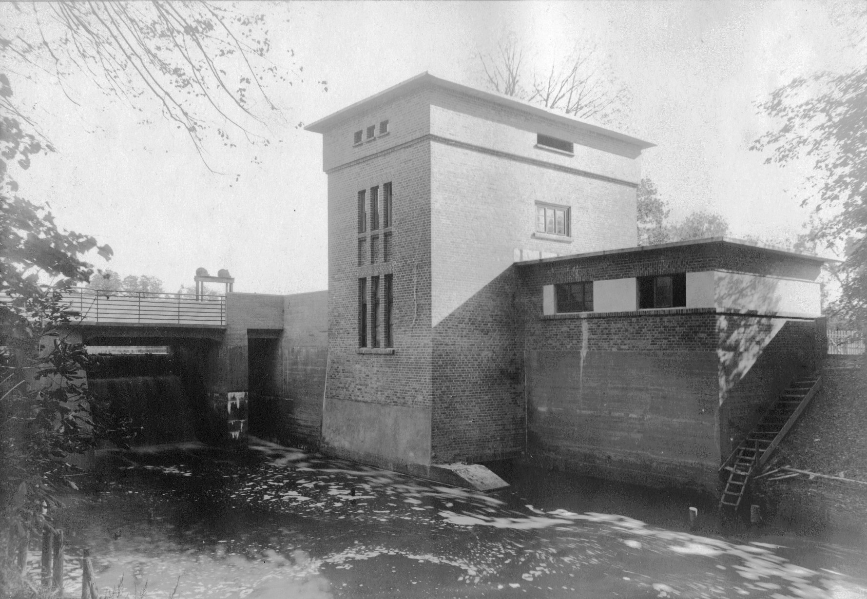 Photo der Wasserkraftanlage am Fluss Omet in Kanoten, Amtsbezirk Posegnick, Kreis Gerdauen, entworfen von Architekt Heinrich Westphal, um 1926